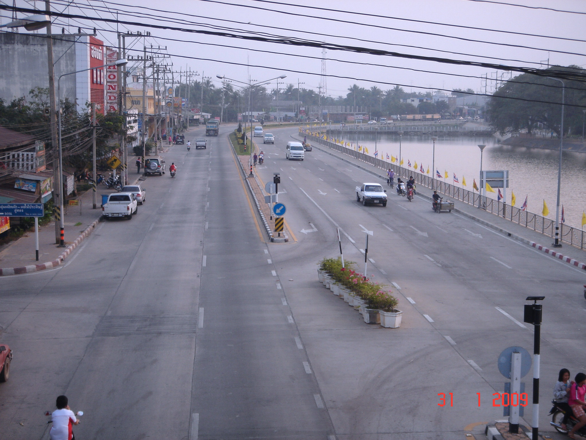 ถนนมาลัยแมน(321)หน้าอำเภออู่ทอง